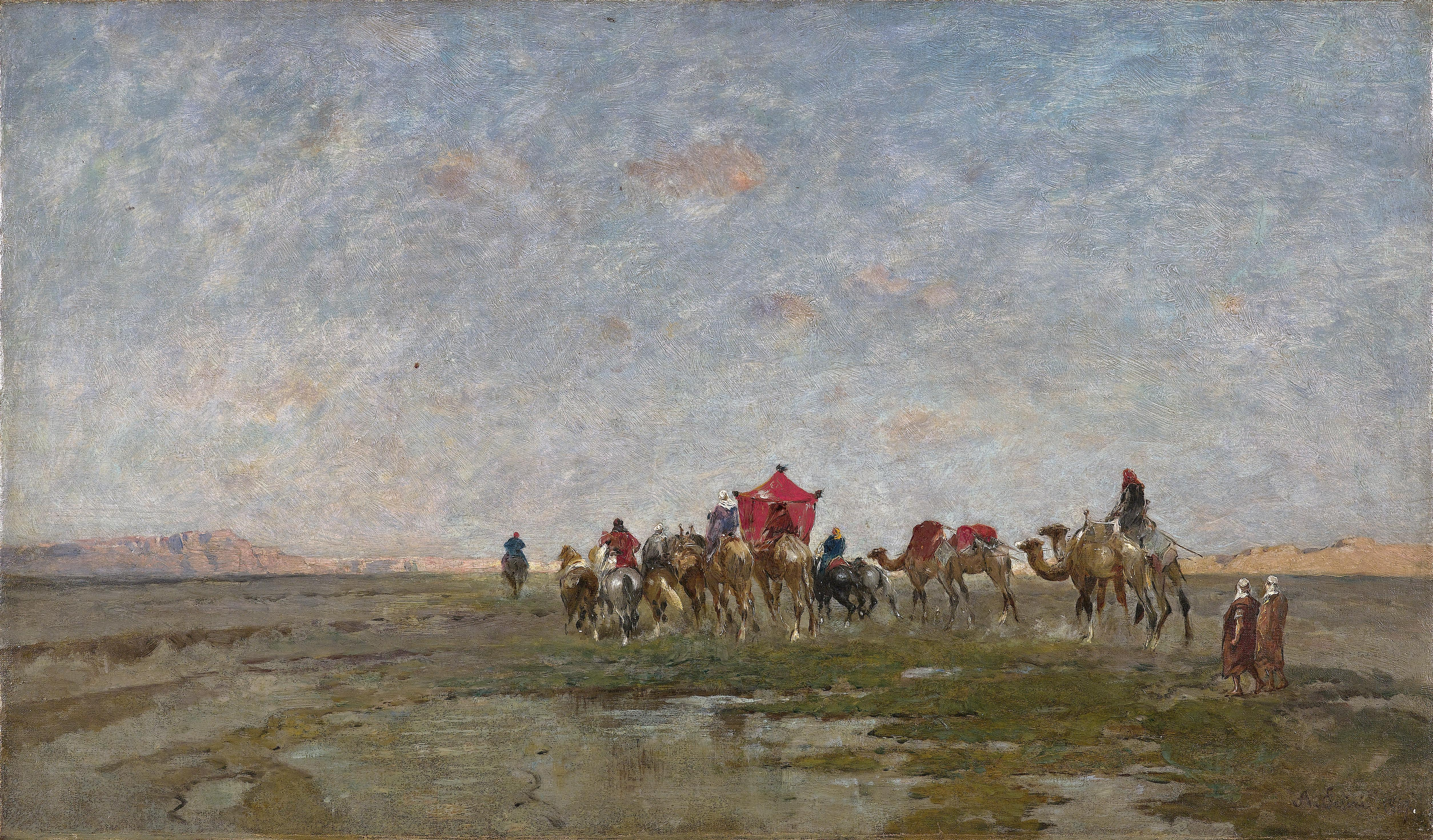 Karawane in der Wüste